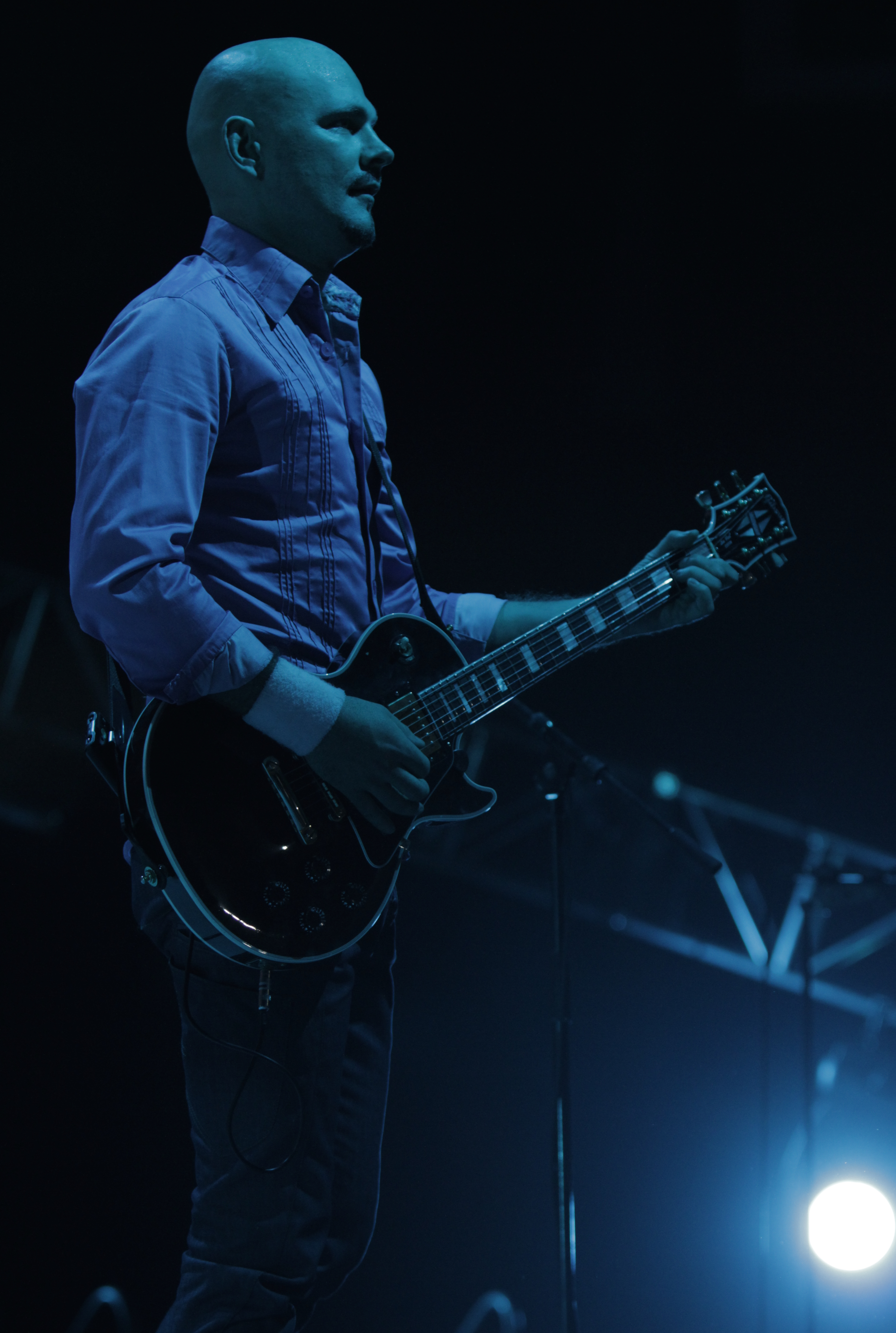 Prāta Vētras ģitārists Jānis Jubalts